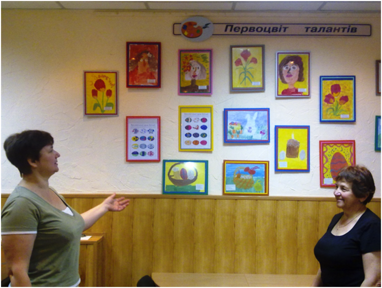 Творчі роботи відвідувачів